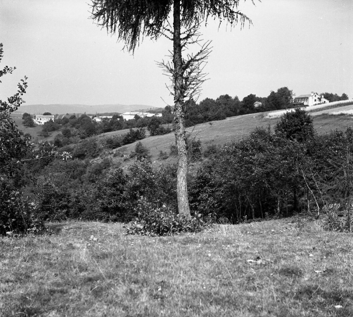 Hiše v Gabrku (s poti Gabrk - Huje).